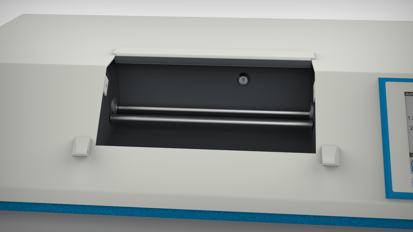 Proben(aufnahme)raum eines Polarimeters der Firma Schmidt + Haensch ohne Probenraumklappe